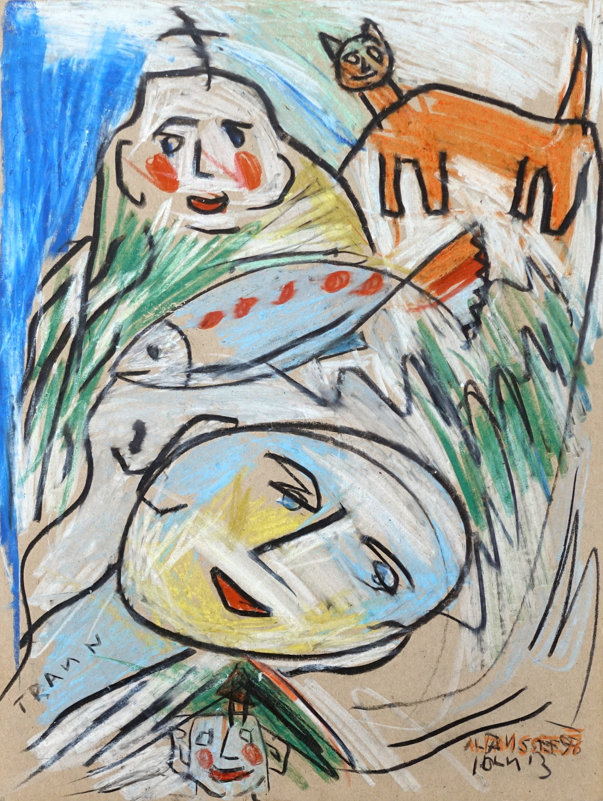 Oscar Holub: LOSER MIT ALTAUSSEERSEE (Kreide auf Karton, 2003)